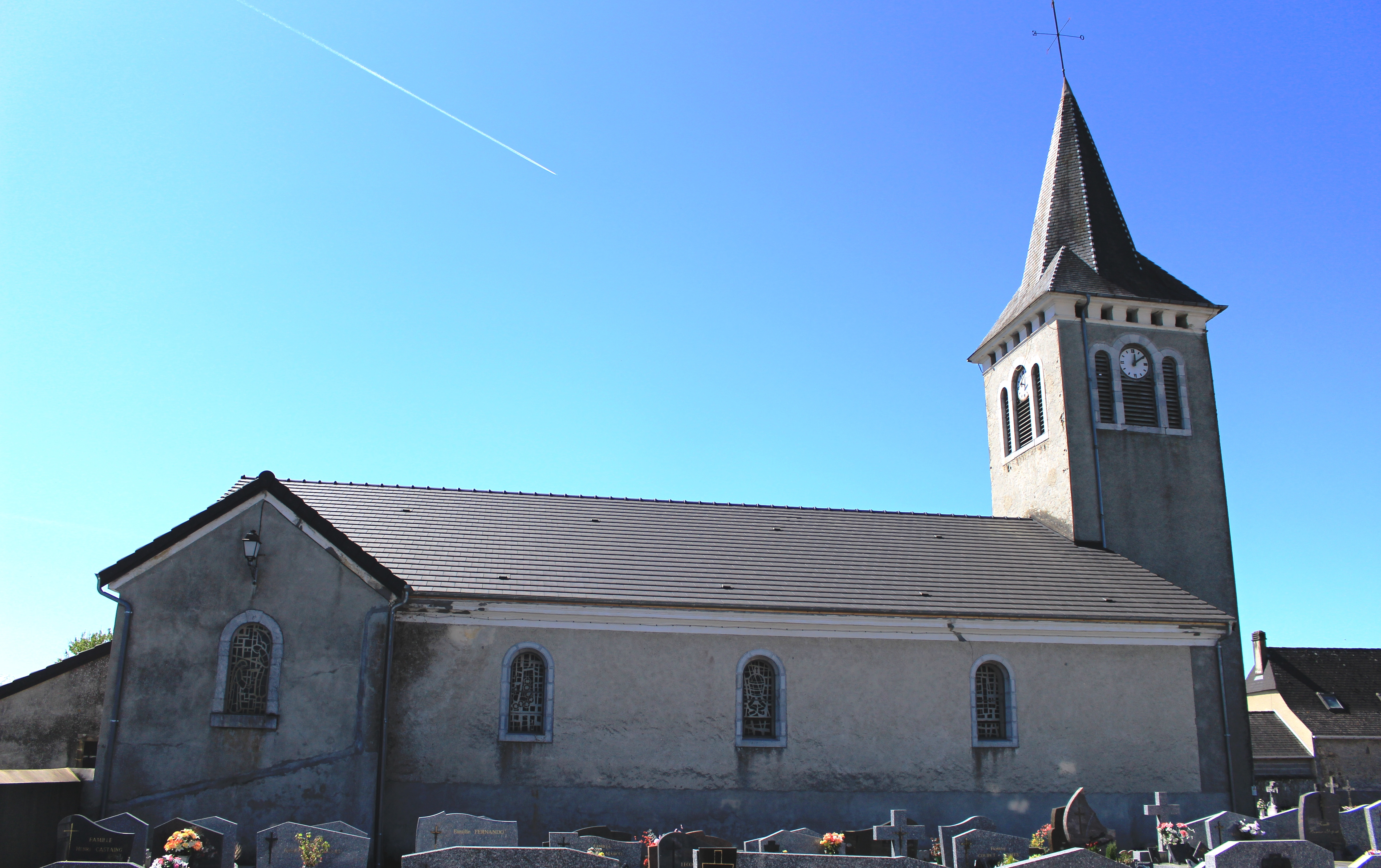 Église Saint-Pierre de Lamarque-Pontacq (Hautes-Pyrénées)